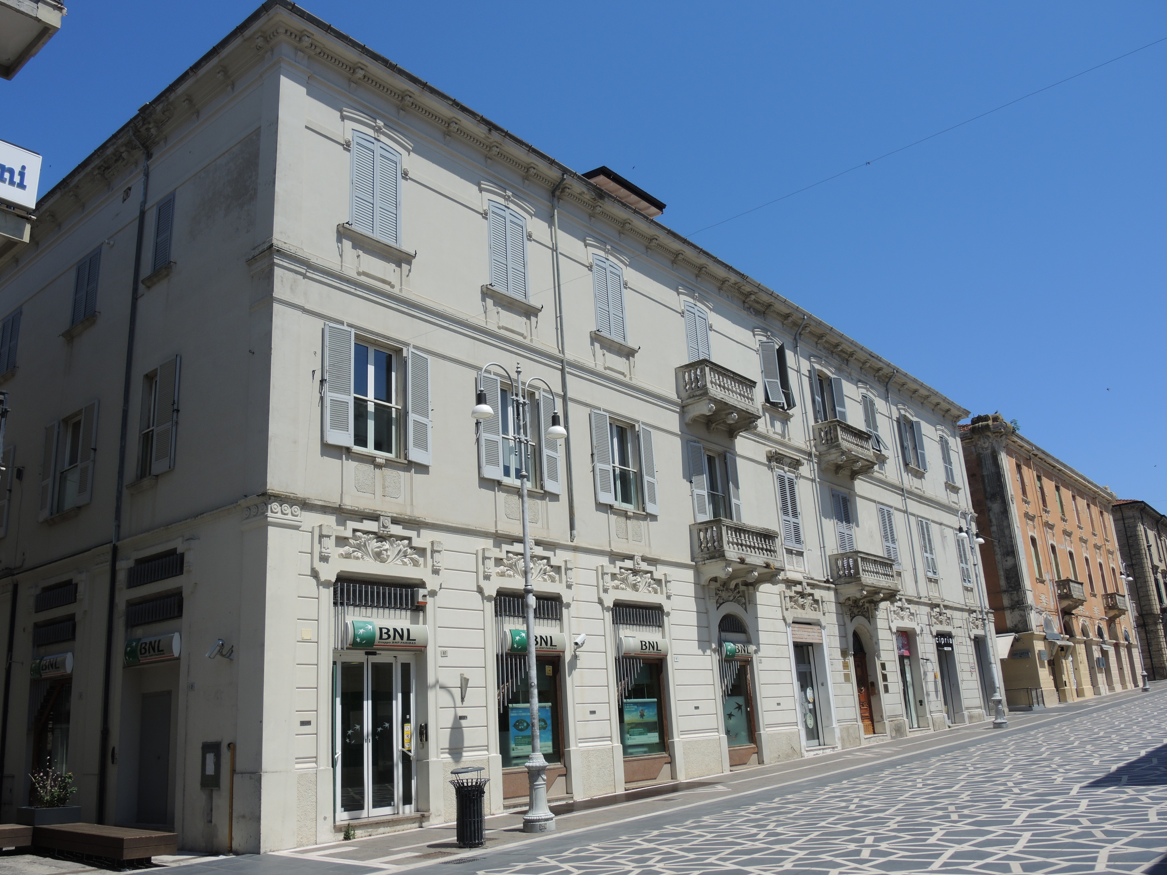 Lanciano